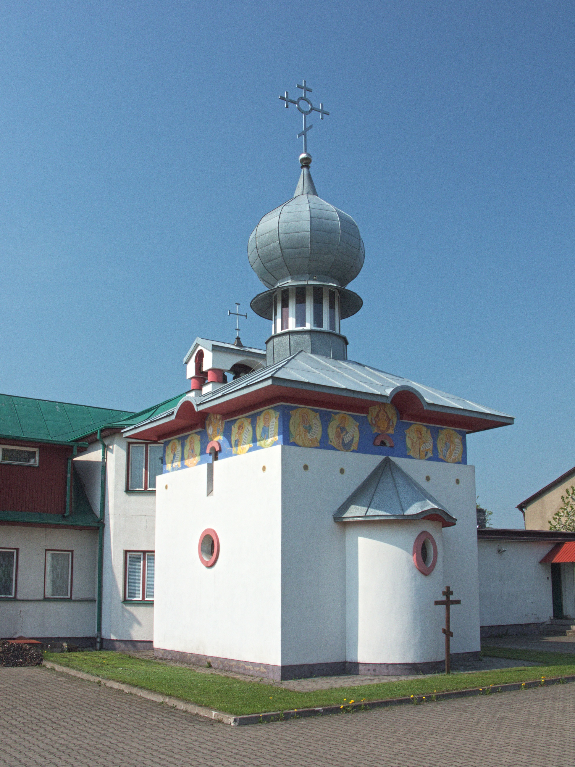 Kaplica Świętej Trójcy przy Policealnym Studium Ikonograficznym w Bielsku Podlaskim.